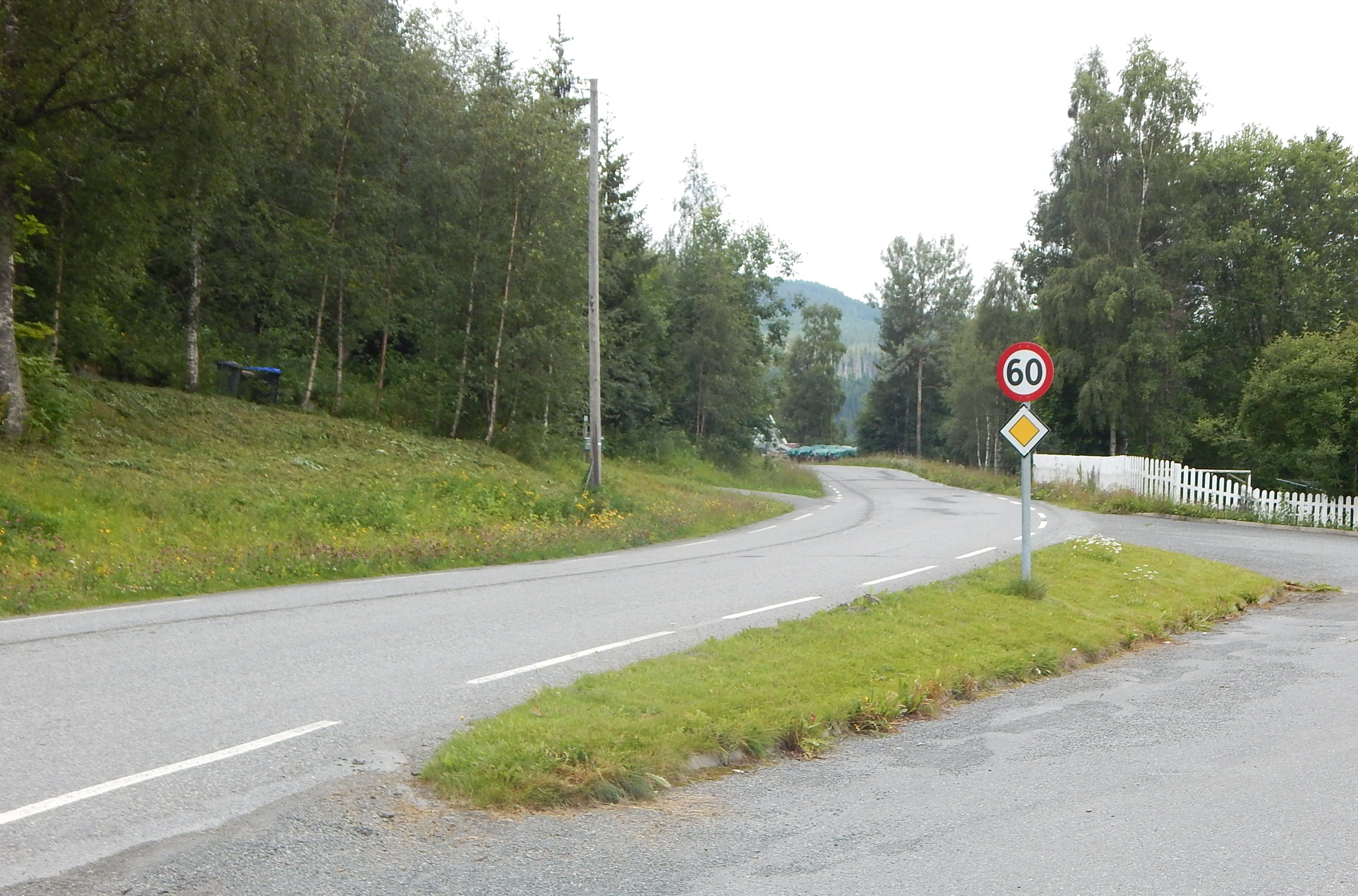 Ytterrovegen (fylkesvei 2416, tidl. 162) nær nordenden i Snertingdal